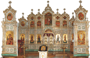 фарфоровый иконостас